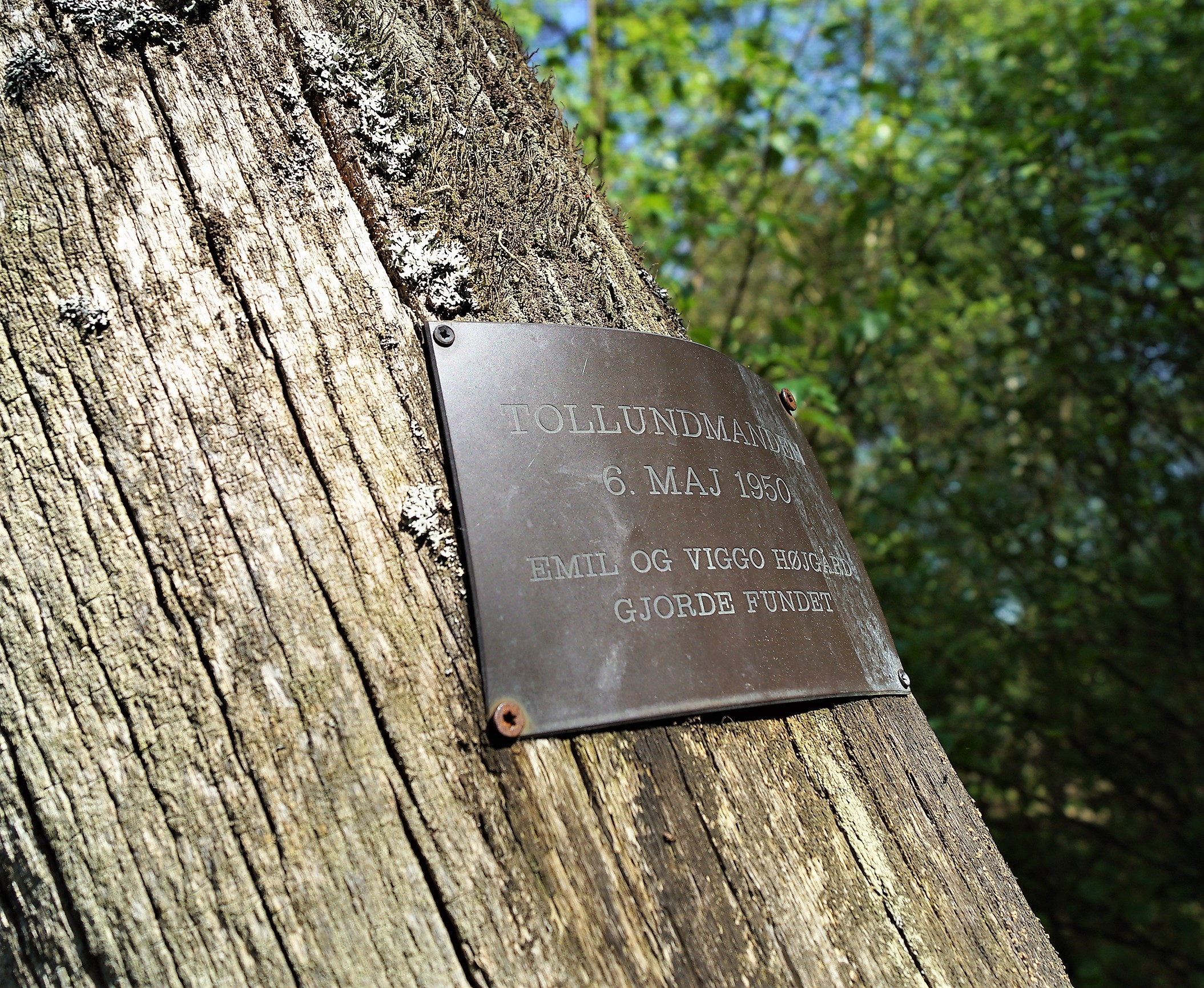 Mindeplade for fundet af Tollundmanden i 1950